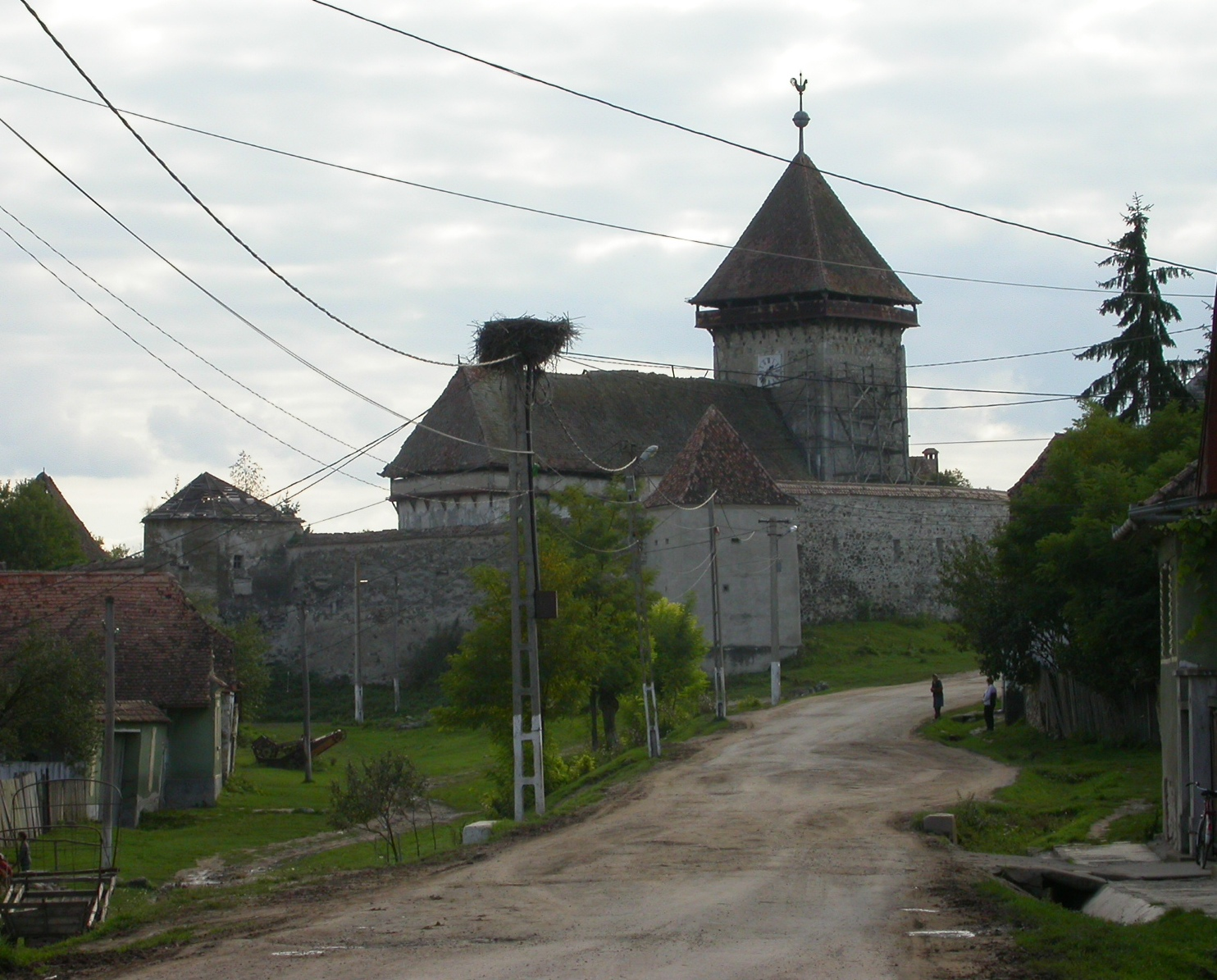 Ansamblul bisericii evanghelice fortificate, sec. XIII-XVII